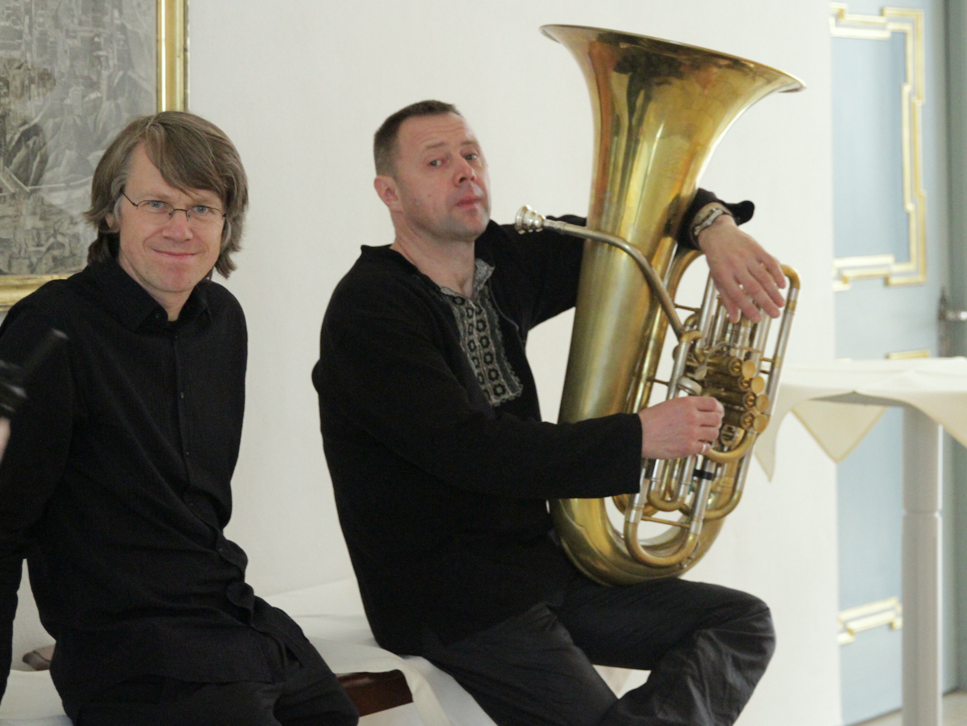 Tonspuren 2014 - Henning Sieverts und François Thuillier Festivalsommer This photo was created with the support of donations to Wikimedia Deutschland in the context of the CPB project "Festival Summer". This file is made available under the Creative Commons CC0 1.0 Universal Public Domain Dedication. The person who associated a work with this deed has dedicated the work to the public domain by waiving all of their rights to the work worldwide under copyright law, including all related and neighboring rights, to the extent allowed by law. You can copy, modify, distribute and perform the work, even for commercial purposes, all without asking permission. Thomas Springer Personality rights warningAlthough this work is freely licensed or in the public domain, the person(s) shown may have rights that legally restrict certain re-uses unless those depicted consent to such uses. In these cases, a model release or other evidence of consent could protect you from infringement claims.